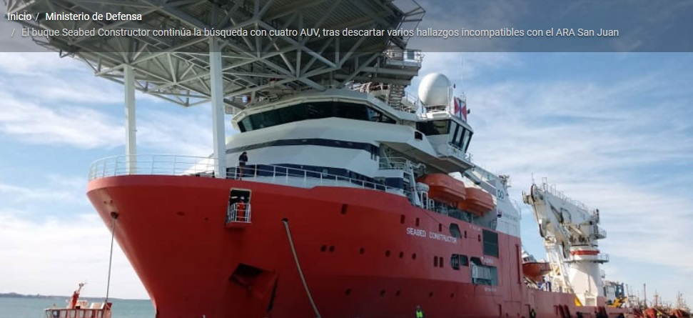 Buque noruego Seabed Constructor en Comodoro Rivadavia, Argentina, antes de iniciar la búsqueda del submarino ARA San Juan.